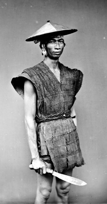 Negatief. Portret van een boer uit Minahasa in boomschorskleding